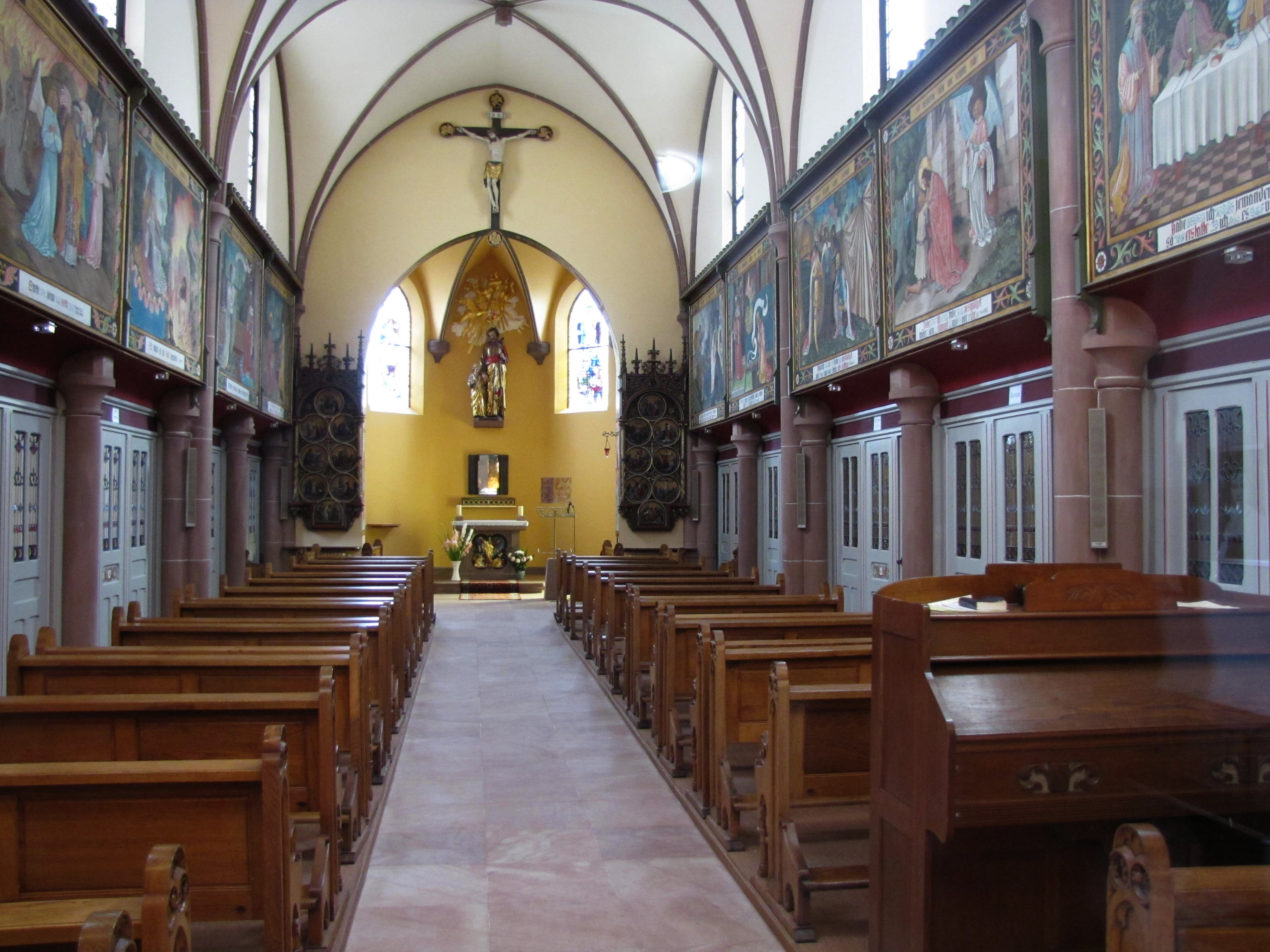 Alsace, Bas-Rhin, Marienthal, Haguenau, Basilique Notre-Dame-des-Douleurs de Marienthal (ancien Prieuré des Guillemites) (IA00062022). Chapelle nord "Saint-Joseph": Peintures murales (Martin de Roermond, 1888).